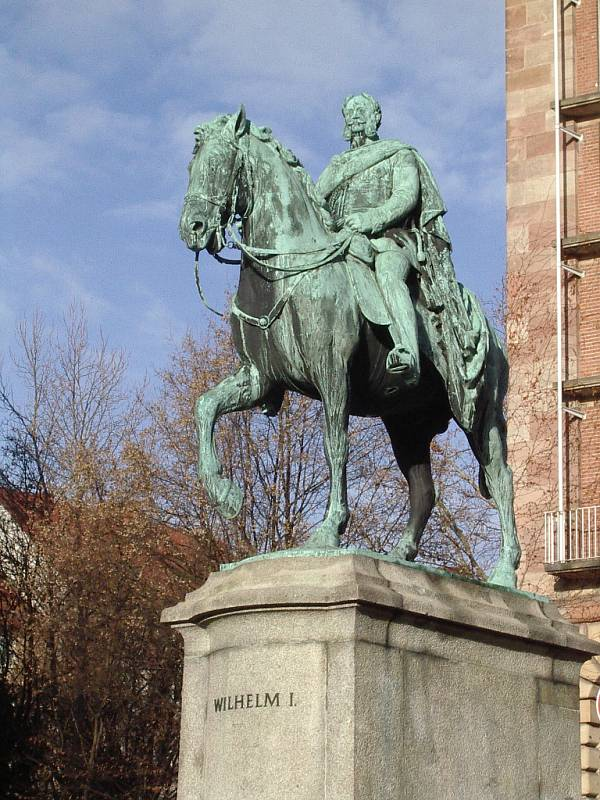 Nürnberg, Egidienplatz. Reiterstandbild Wilhelm I., 1905 von Wilhelm von Ruemann. Fotografiert von Südosten.